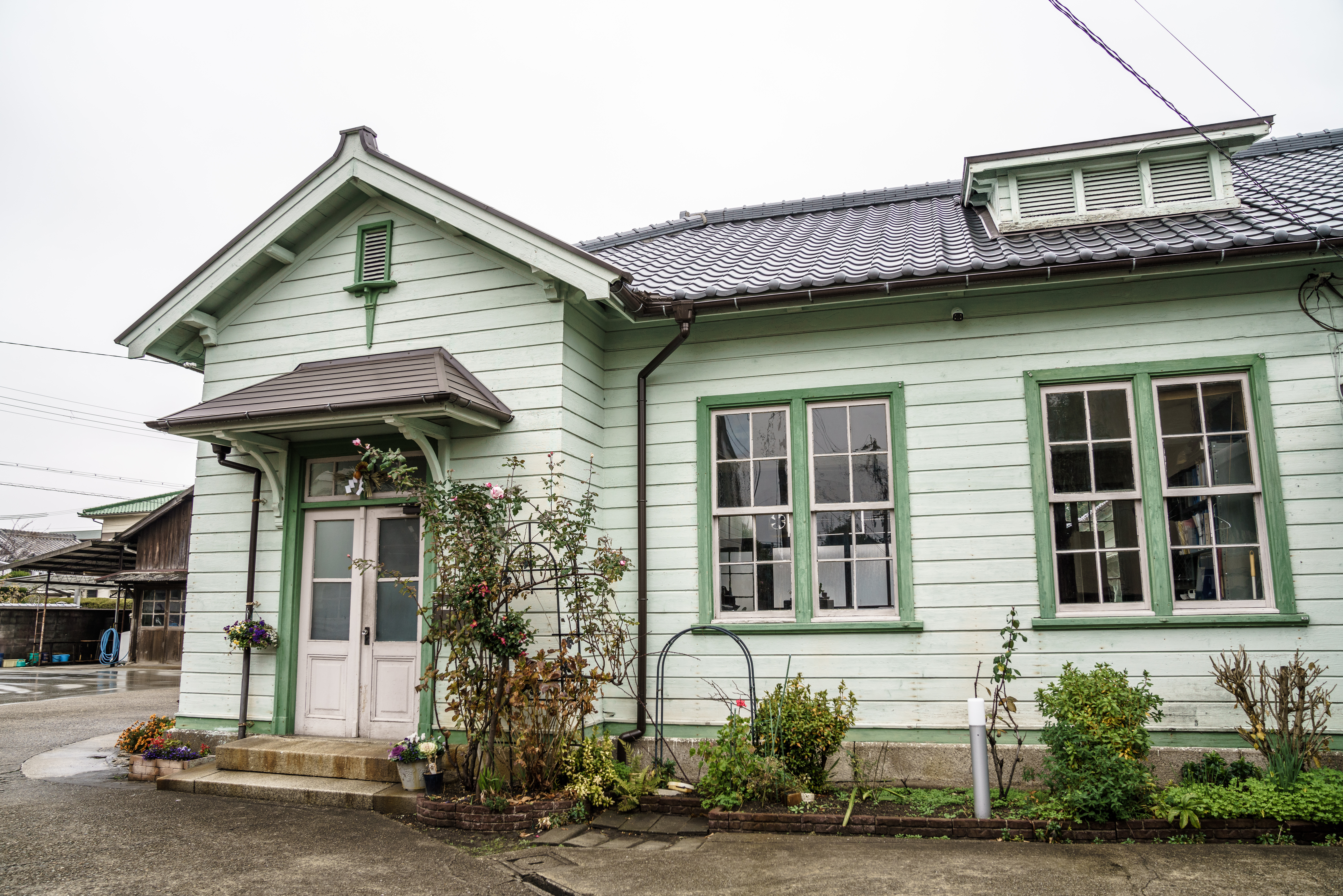 現在の旧赤穂塩務局網干出張所（2019年撮影）